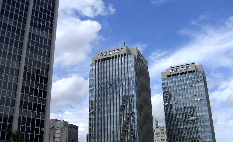 Cruzamento da Av. Faria Lima com a Av. Rebouças, São Paulo, Brasil